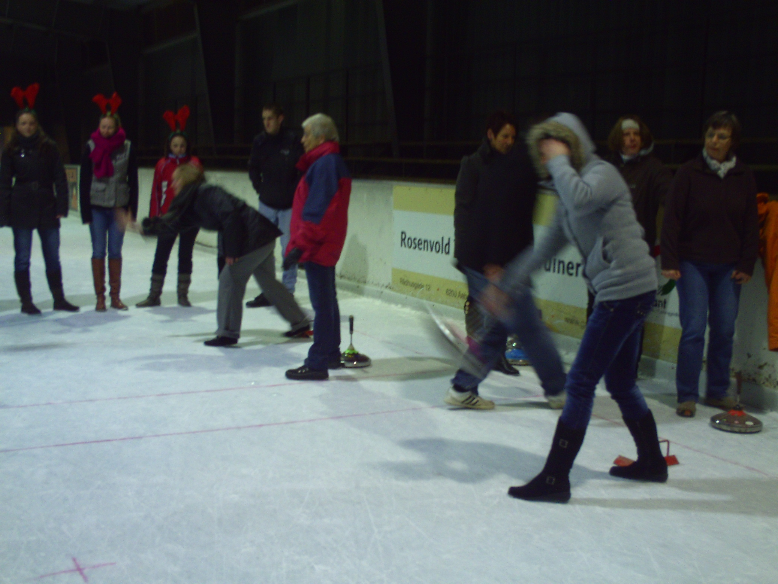 Eisstockscheßen in der Eishalle